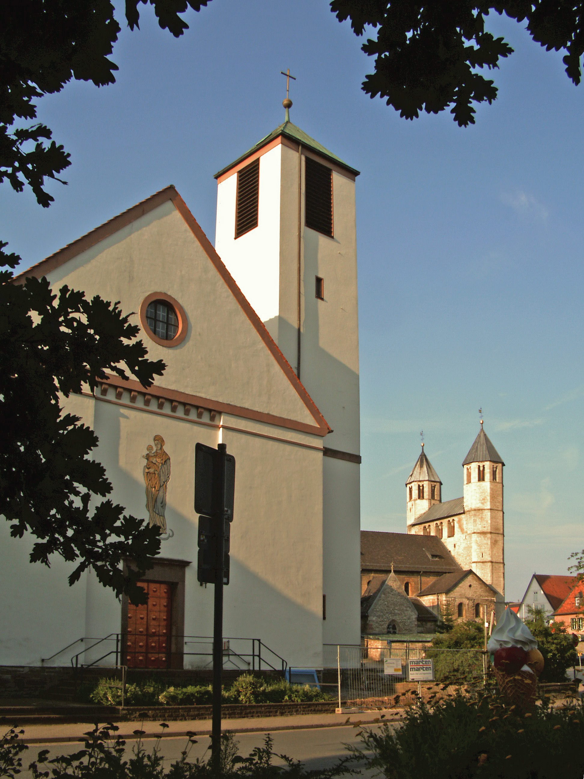 Katholische Kirche St. Maria Himmelfahrt in Bad Gandersheim, mit der heute ev. Kirche im Hintergrund